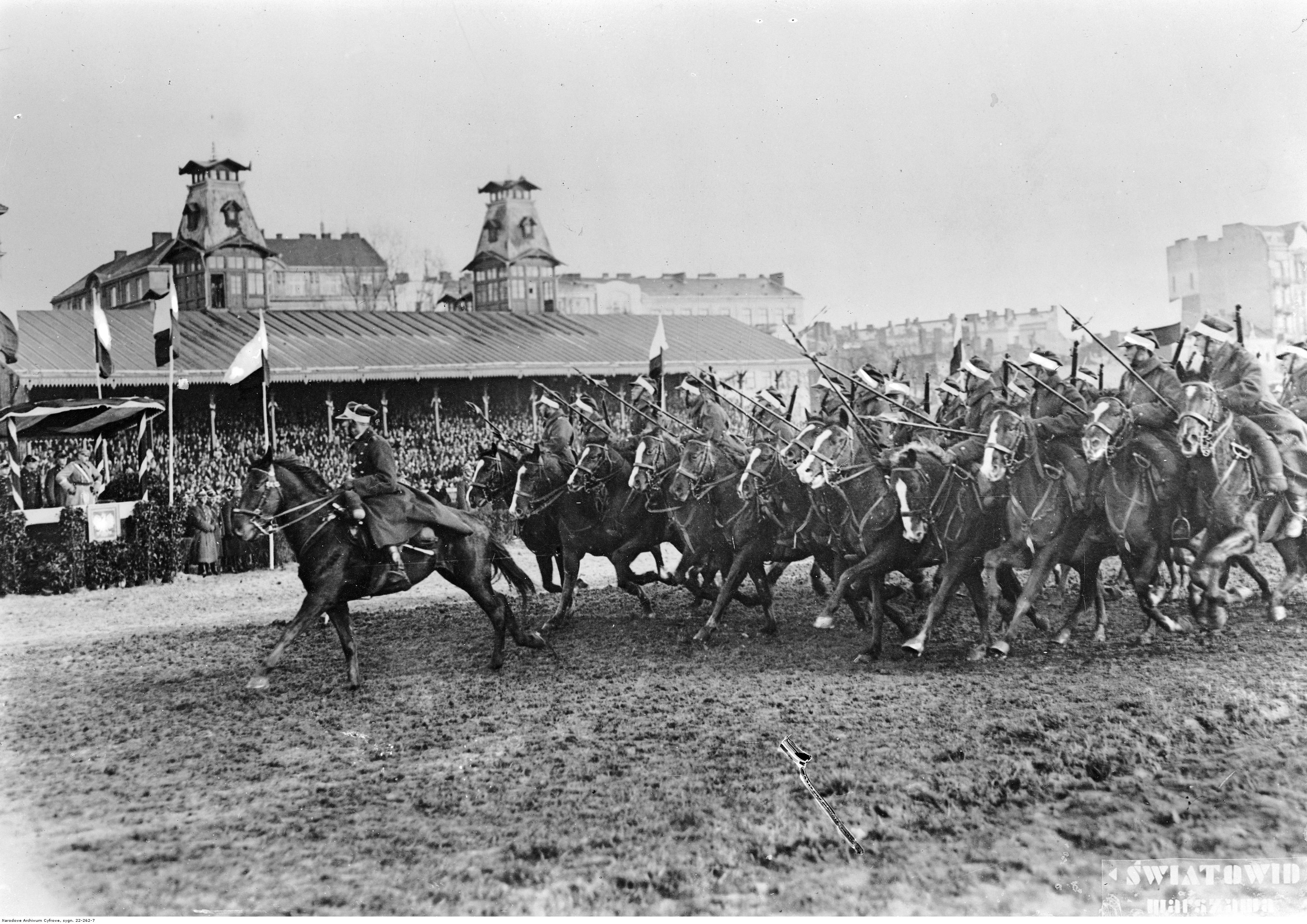 Szwadron 11 Pułku Ułanów Legionowych na defiladzie. Na trybunie honorowej marszałek Józef Piłsudski (w jasnym mundurze).